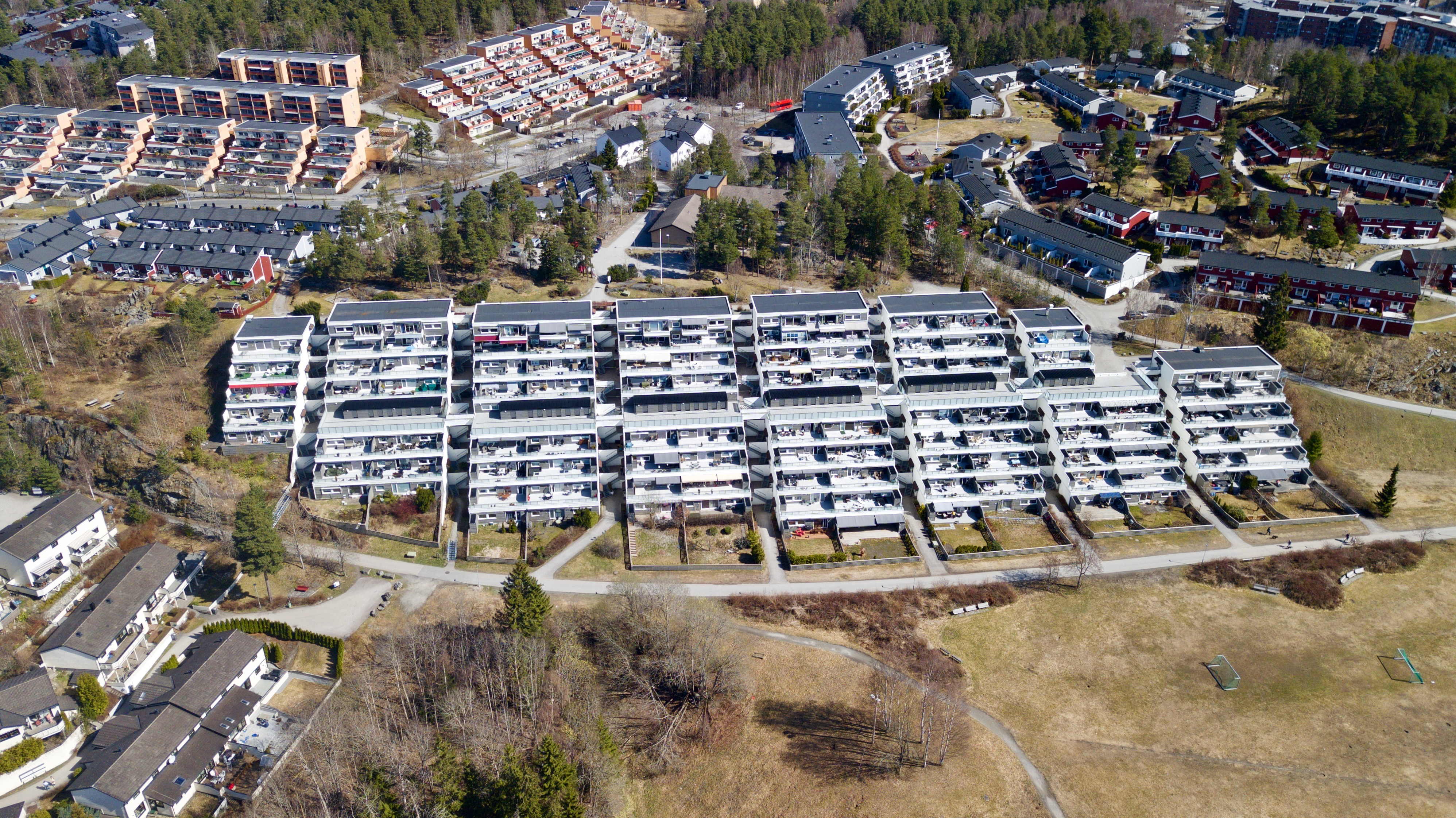 Terasseblokk i Ravnkroken. Holmlia i Oslo.